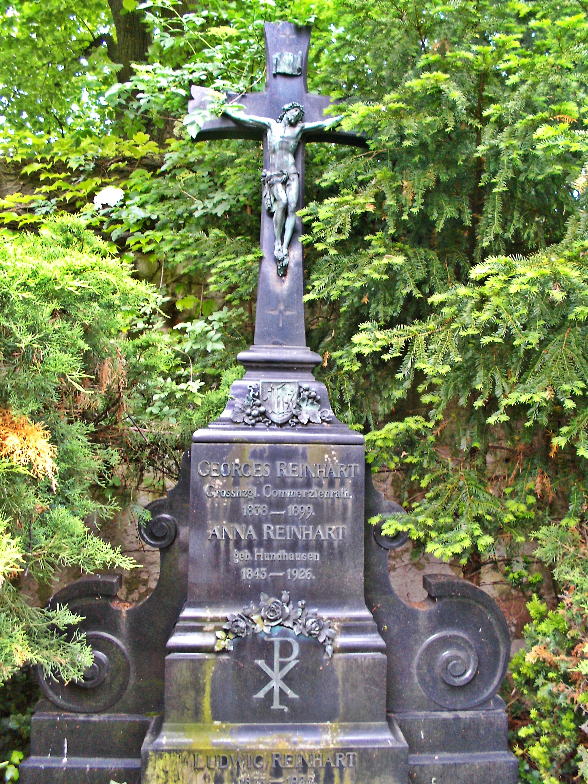 Georg Christof Reinhart (1838-1899), Lederfabrikant und Kommerzienrat in Worms. Grab Hauptfriedhof Worms.